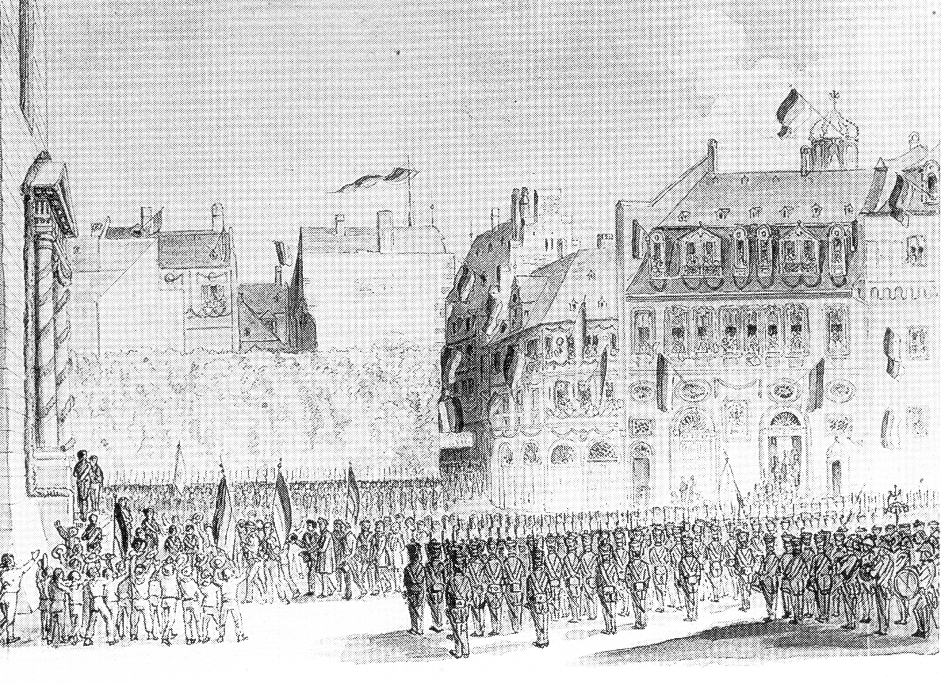 Bleistift, Feder von W. A. Beer. Zug der Abgeordneten des Vorparlaments zur Paulskirche, 30. März 1848.